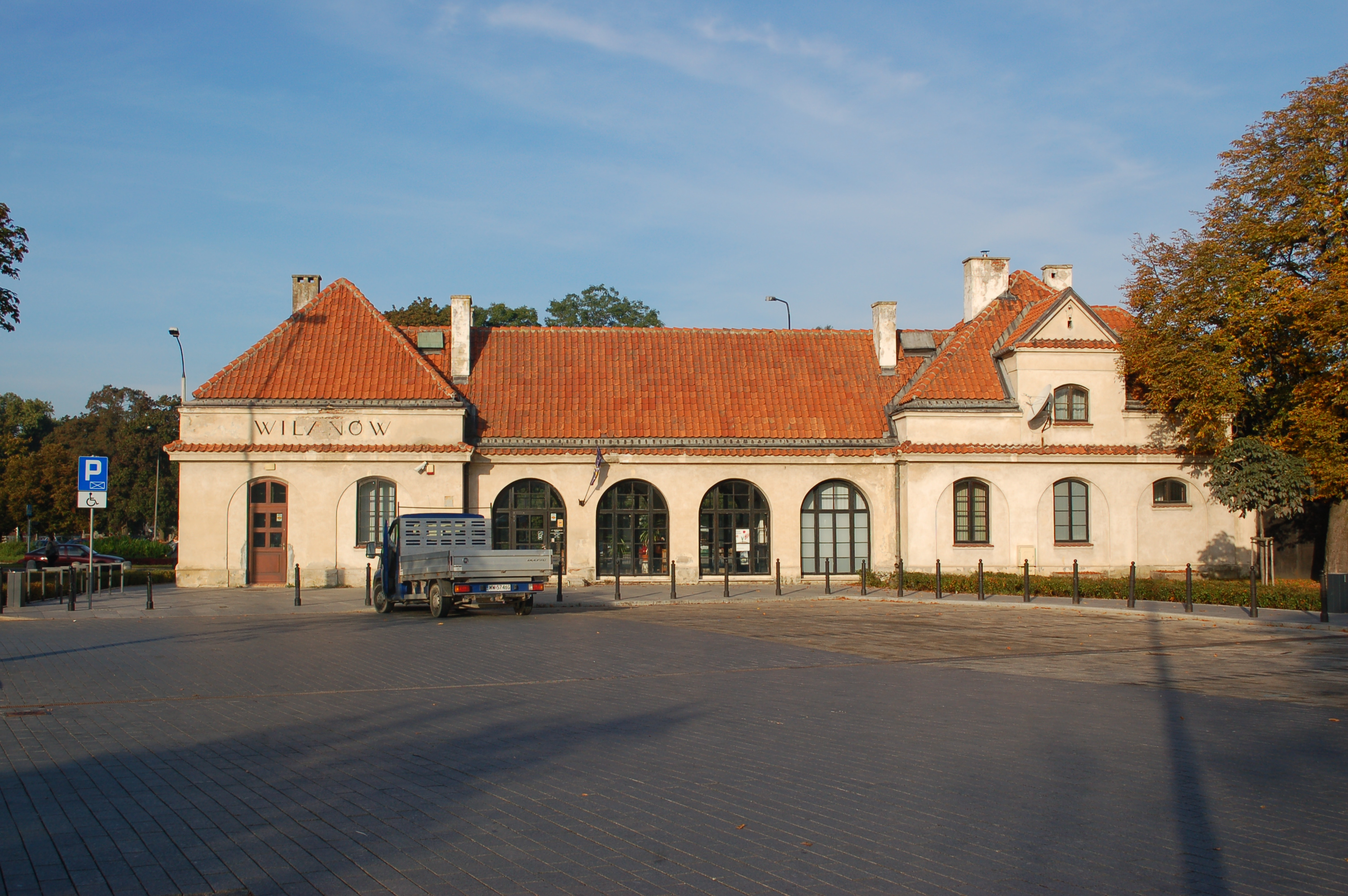 Wilanów, ehemaliger Bahnhof, heute Post